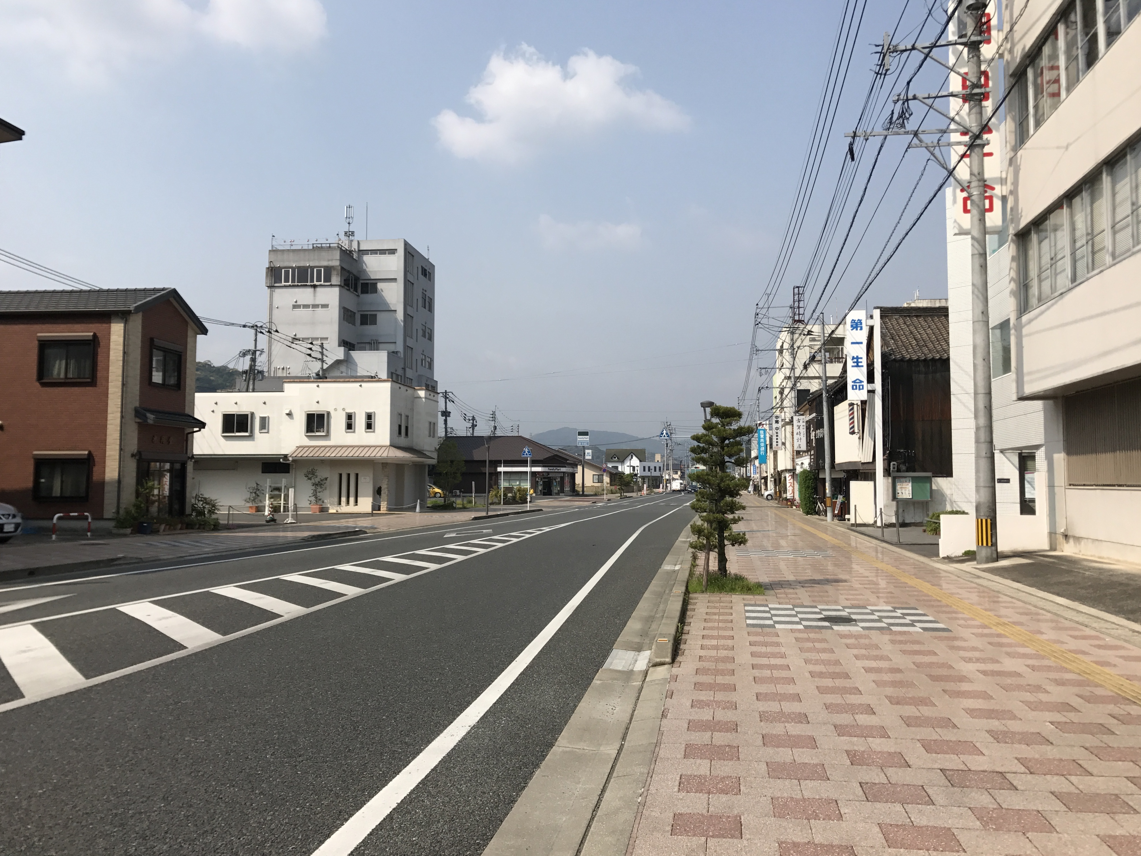 武雄町西浦交差点西側の佐賀県道24号